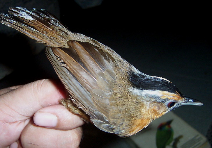 Pellorneum capistratum from Situgede, Bogor, West Java, Indonesia